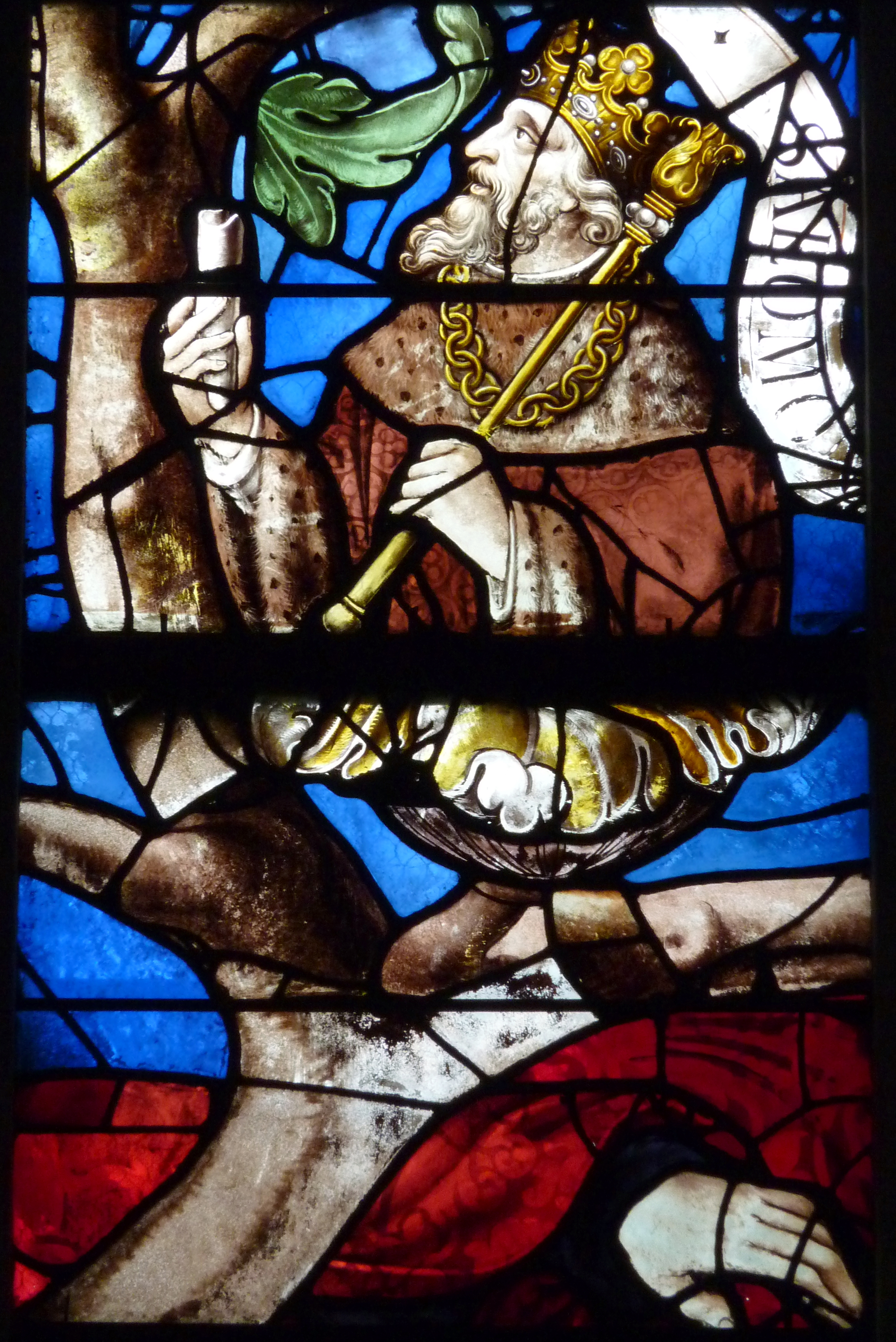 Bleiglasfenster in der katholischen Pfarrkirche Saint-Martin in Groslay, Darstellung: Wurzel Jesse mit Ausschnitt: Salomo